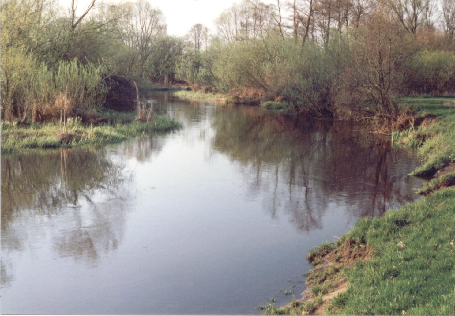 Rzeka Rawka w Nowym Dworze (powiat skierniewicki, województwo łódzkie)River Rawka in Nowy Dwór (Lodz Voivodship, Poland)